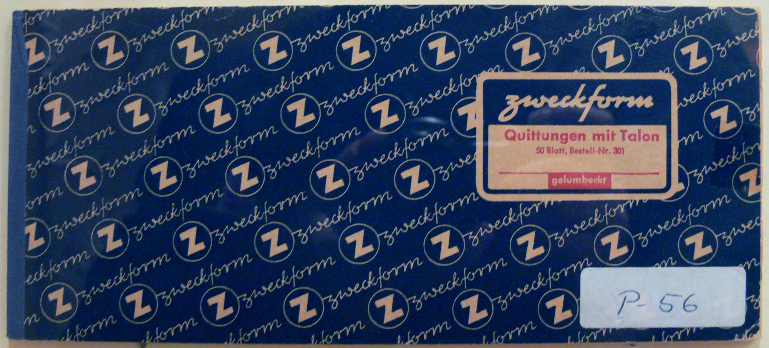 Quittungsvordrucke Zweckform, um 1950 Fotografiert in der Ausstellung "Am Anfang war das Formular", Museum für Kommunikation Frankfurt, 2008